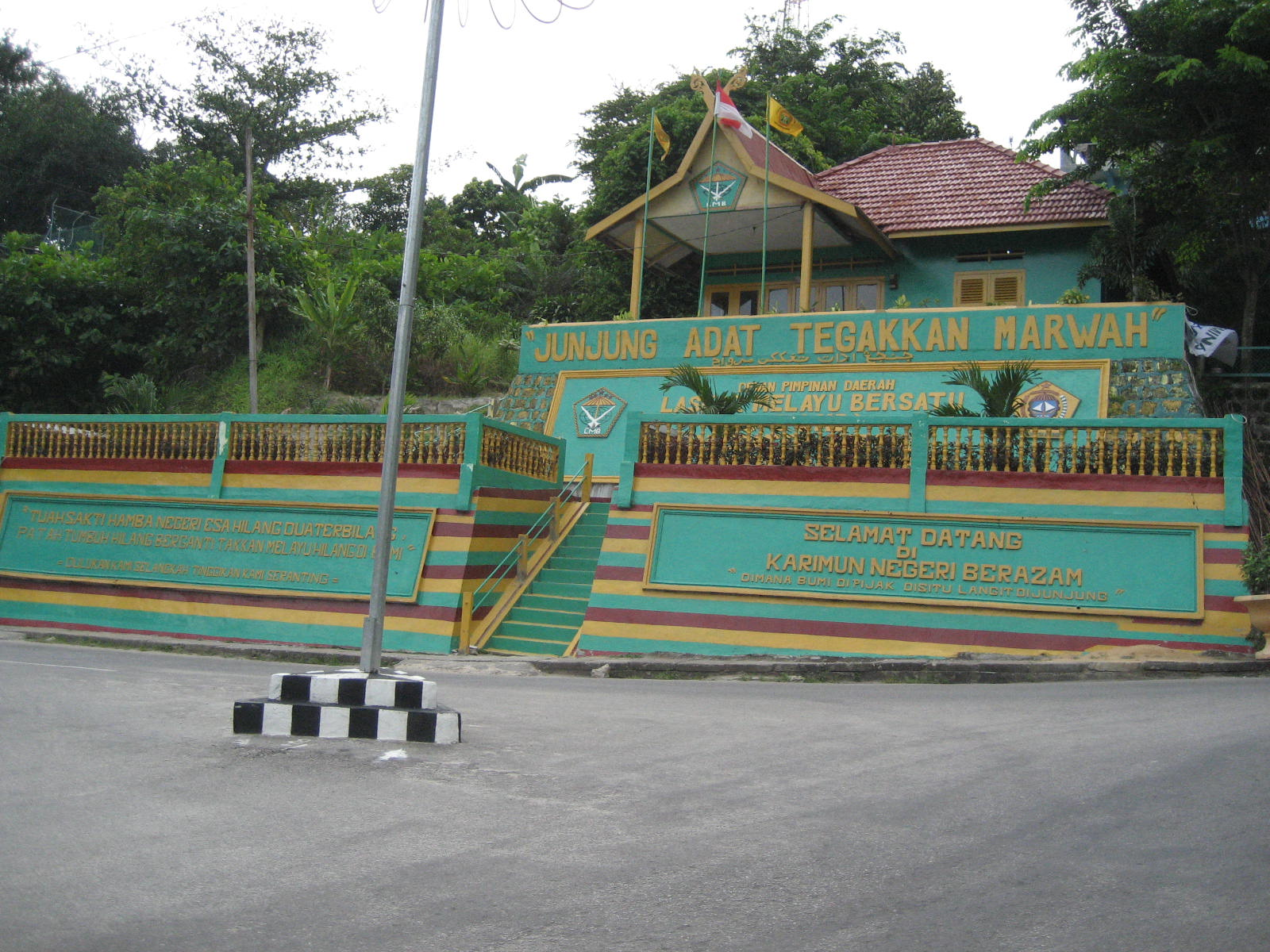 Tanjung Balai, Karimun island, Indonesia